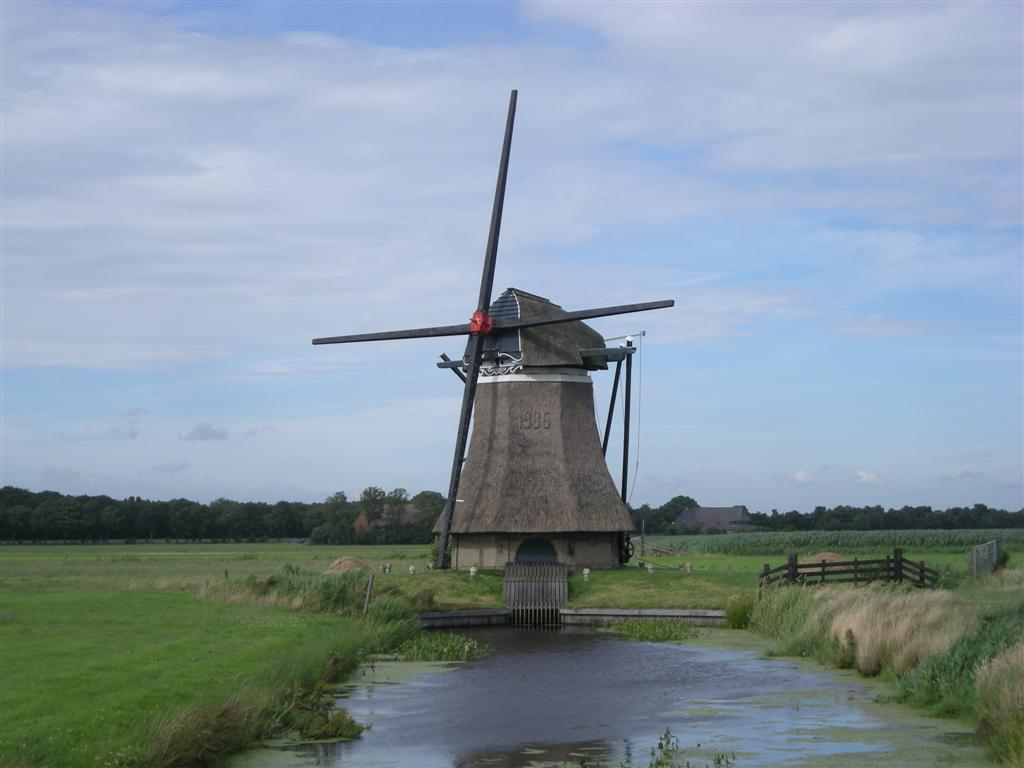 Zwaantje, molen bij Nijemirdum